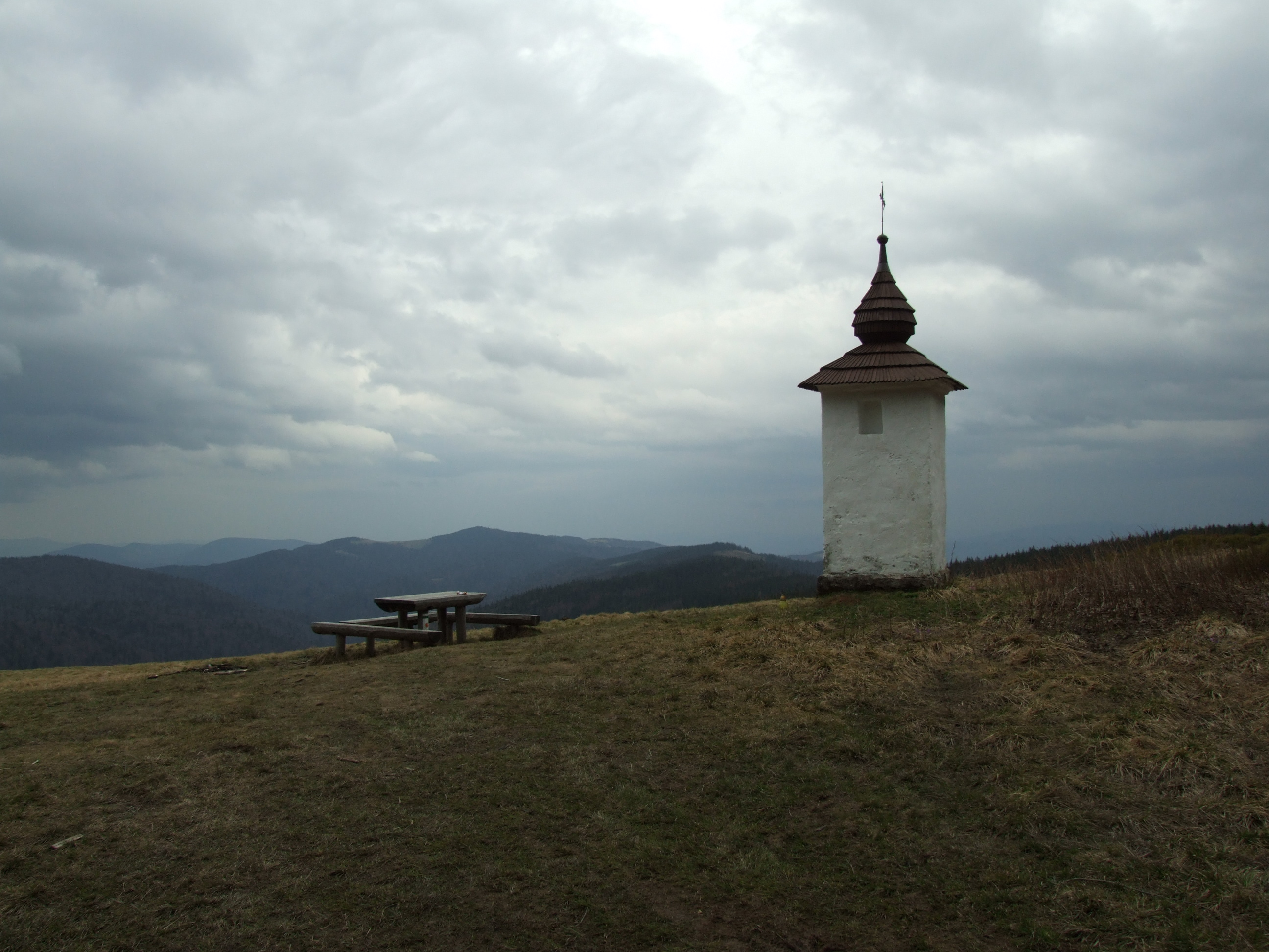 Gorce - kapliczka Bulandy pochmurną porą